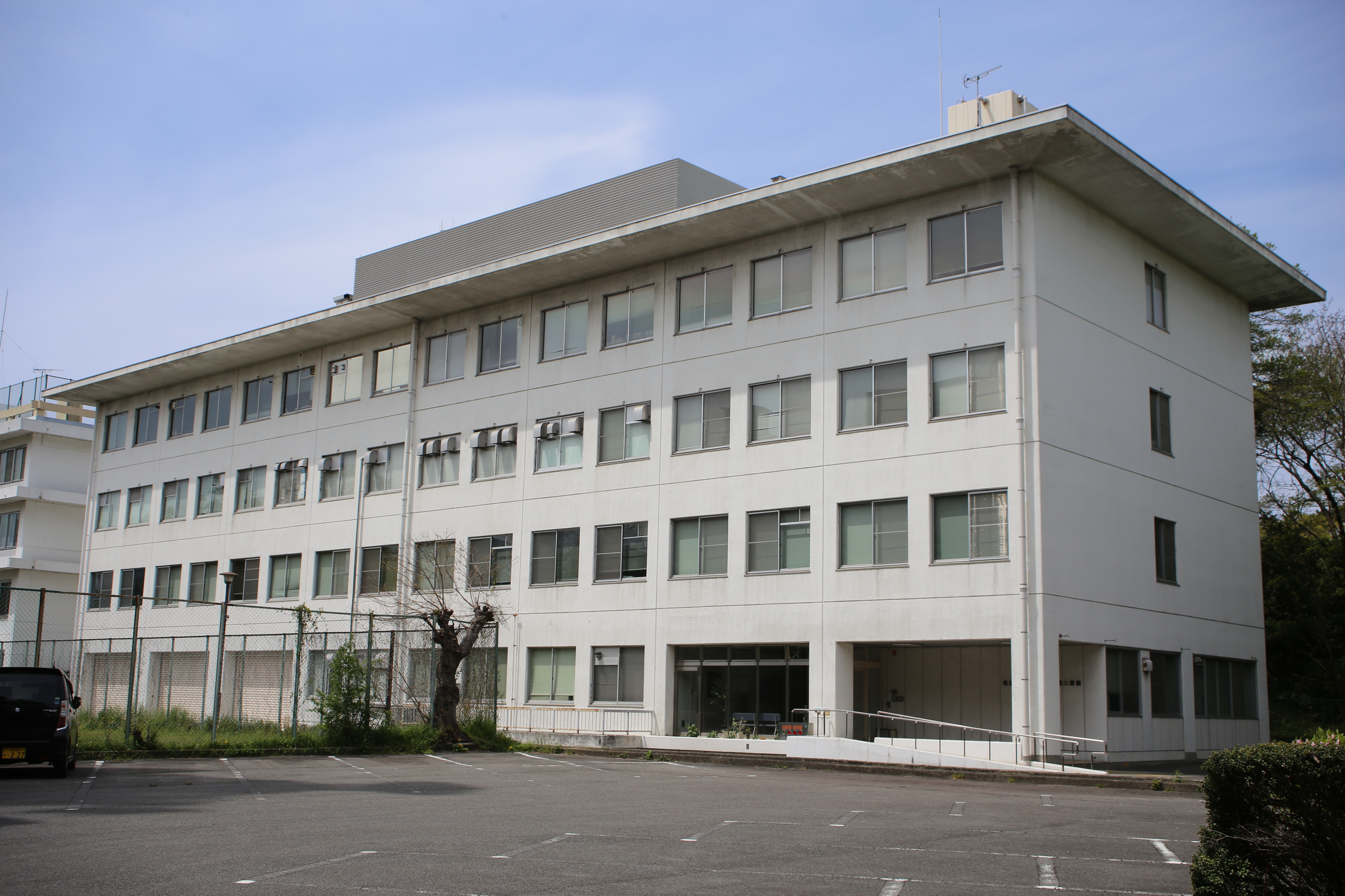 名古屋市中区三の丸一丁目の農林水産省東海農政局